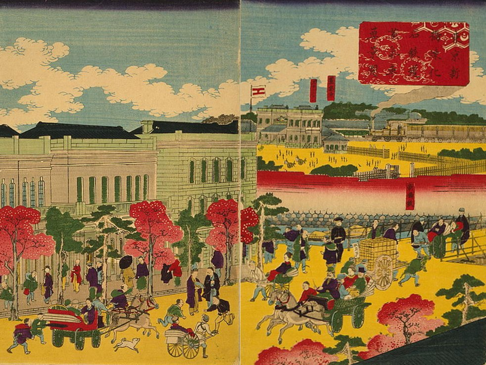 Tōkyō shimbashi rengaishi tetsudō jōkisha shinkei zu / Brick buildings and a steam train in Shimbashi, Tokyo. 東京新橋煉化石鉄道蒸気車真景図 東亰新橋煉化石鐵道蒸氣車真景圖